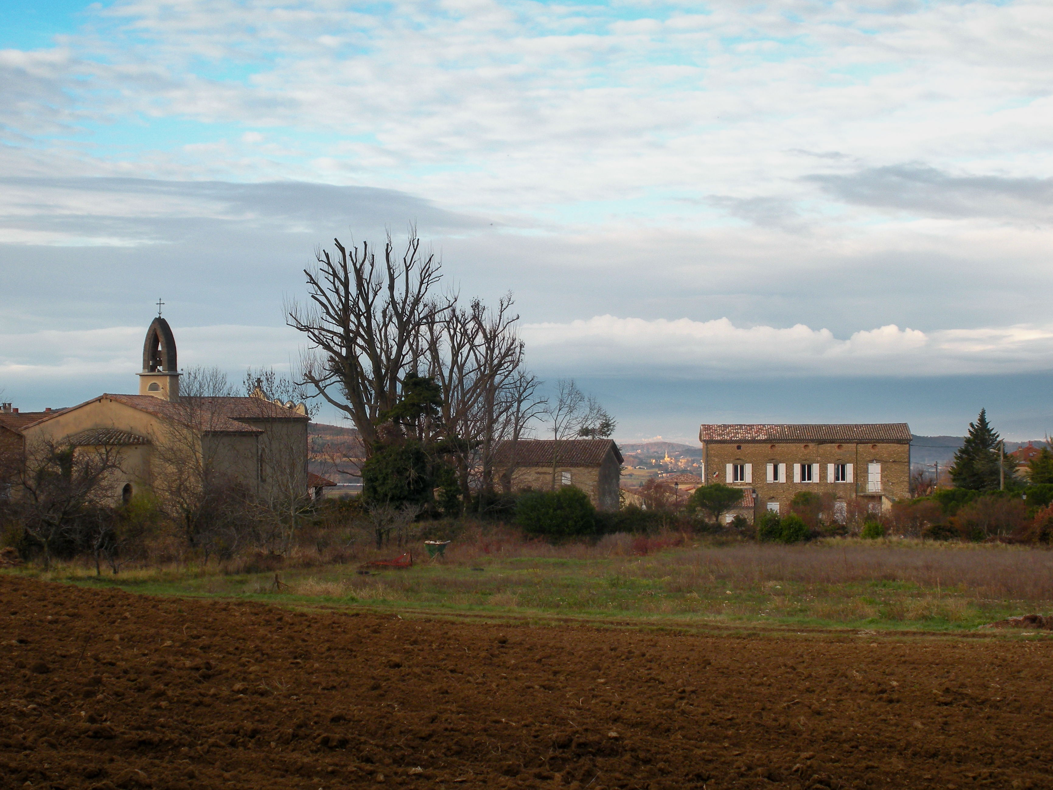 Eglise et mairie d'Ourches